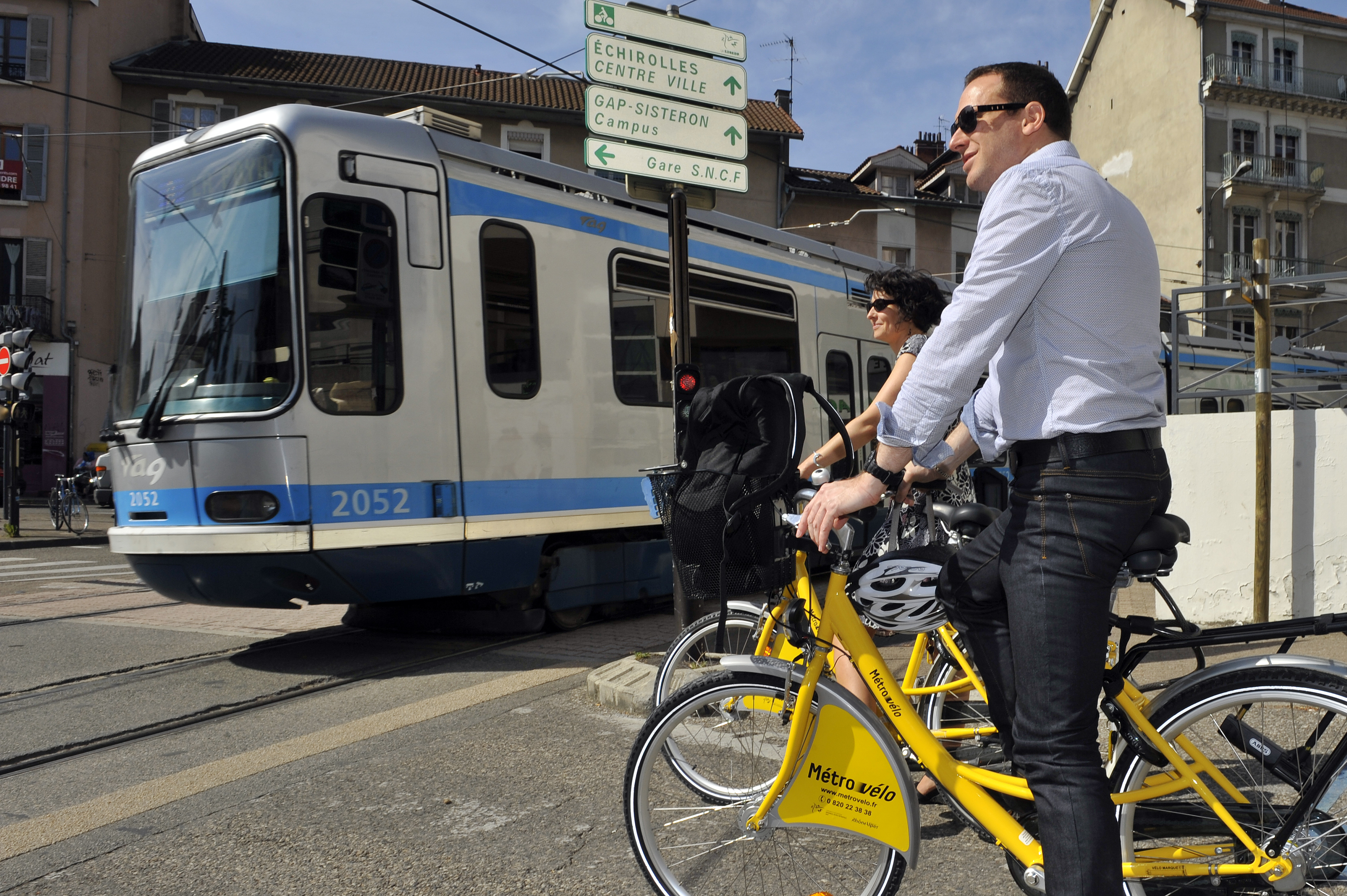 Photo d'un Métrovélo et d'un tramway